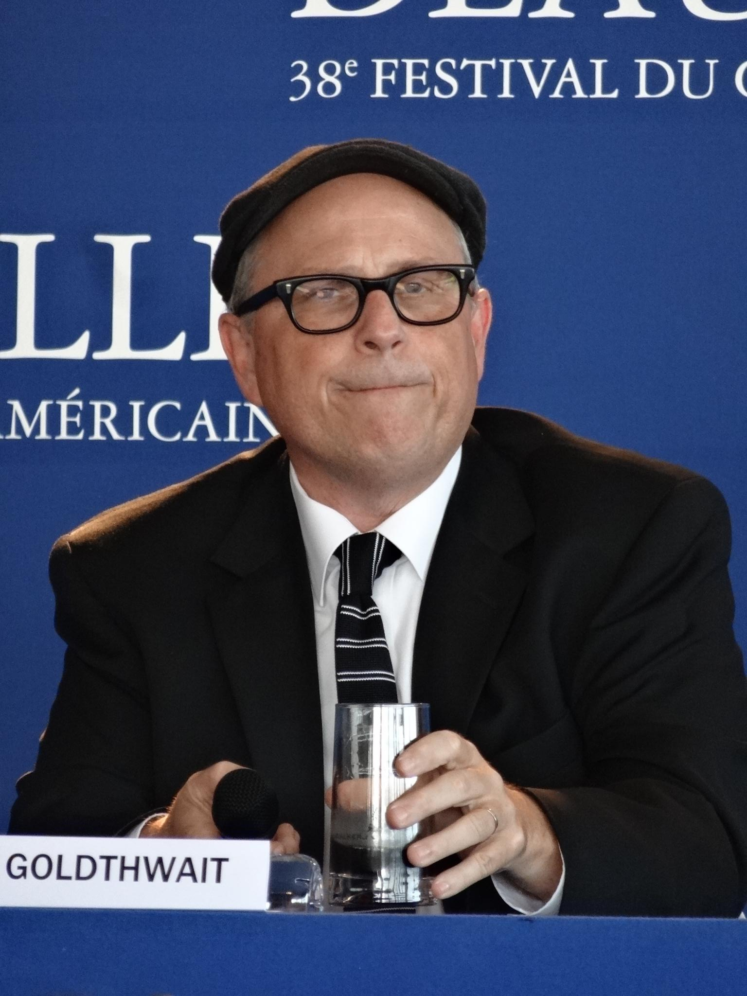 Festival de deauville 2012